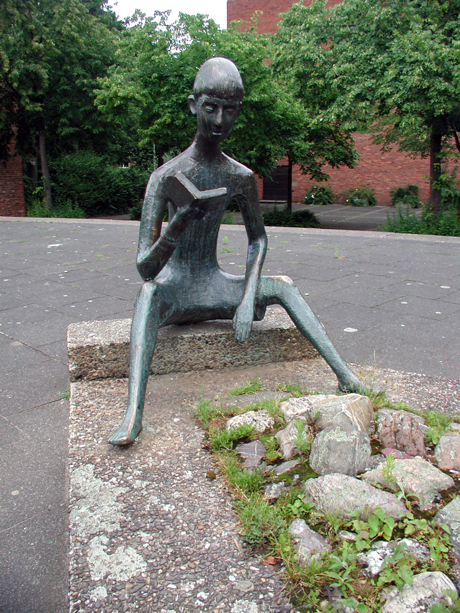 Nonnibrunnen von Lambert Schmitthausen. Köln-Ehrenfeld, Melatener Weg. Der Brunnen erinnert an den isländischen Jugendbuchdichter Jôn Svenson, genannt Nonni